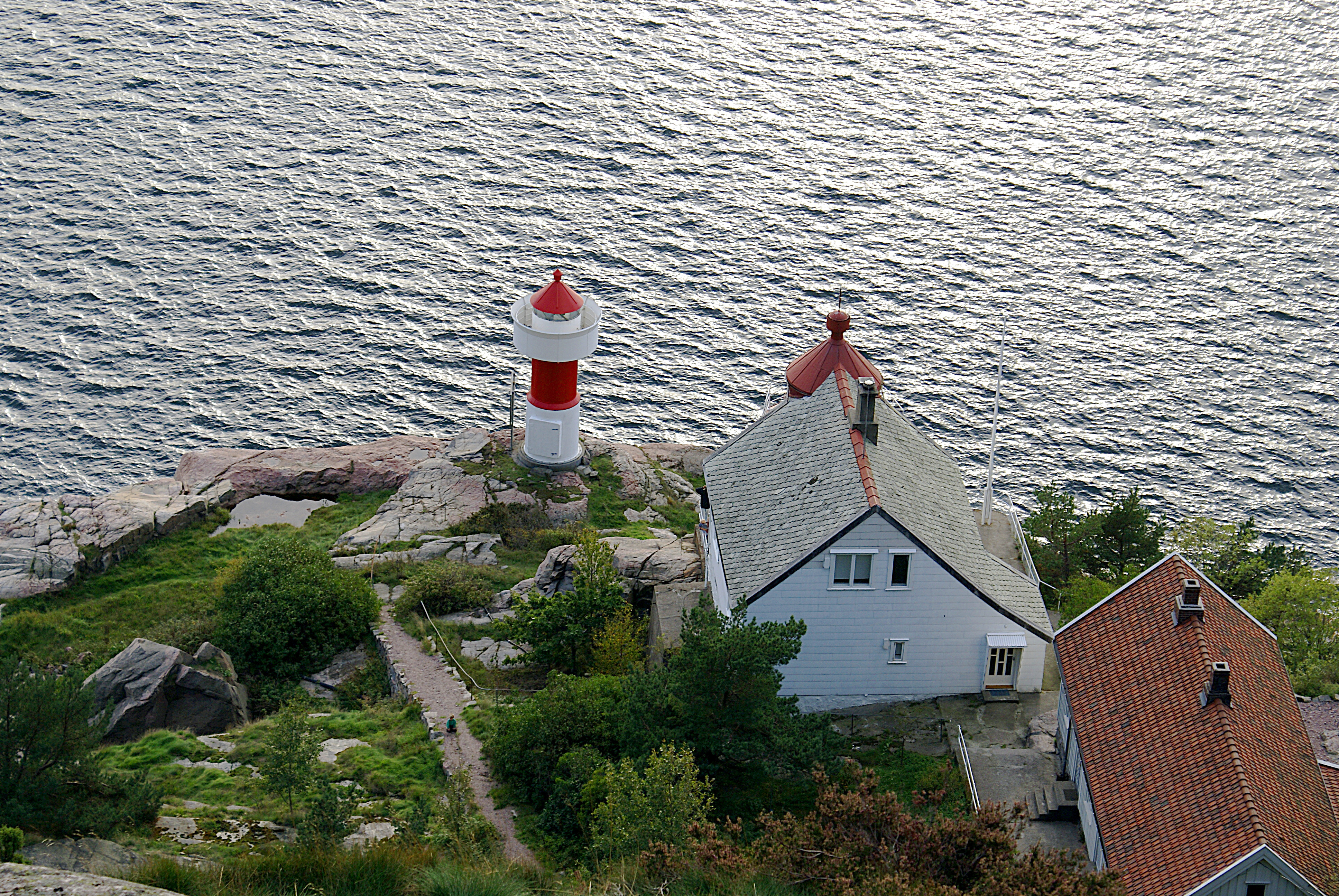 Odderøya fyr